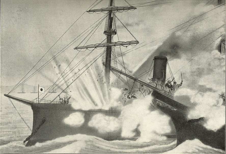 Japanese war Kaiten vs Kotetu